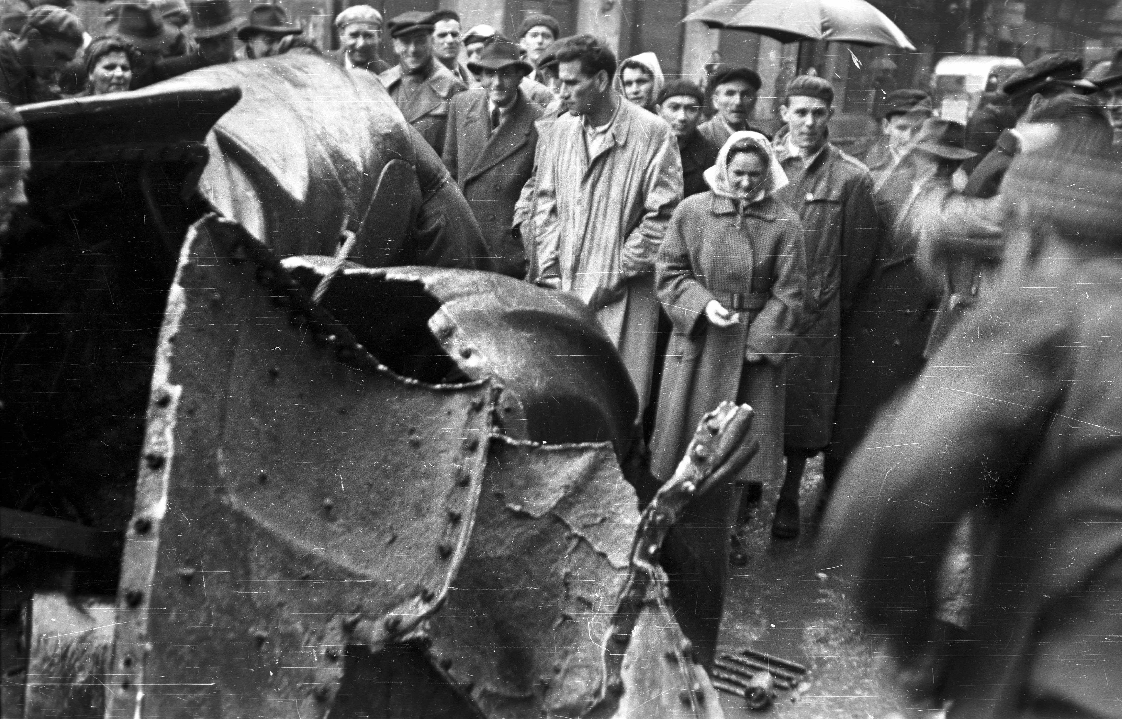 Akácfa utca, a feldarabolt Sztálin szobor. Location: Hungary, Budapest VII. Tags: destruction of symbols, sculpture, Budapest, revolution Title: Akácfa utca, a feldarabolt Sztálin szobor.